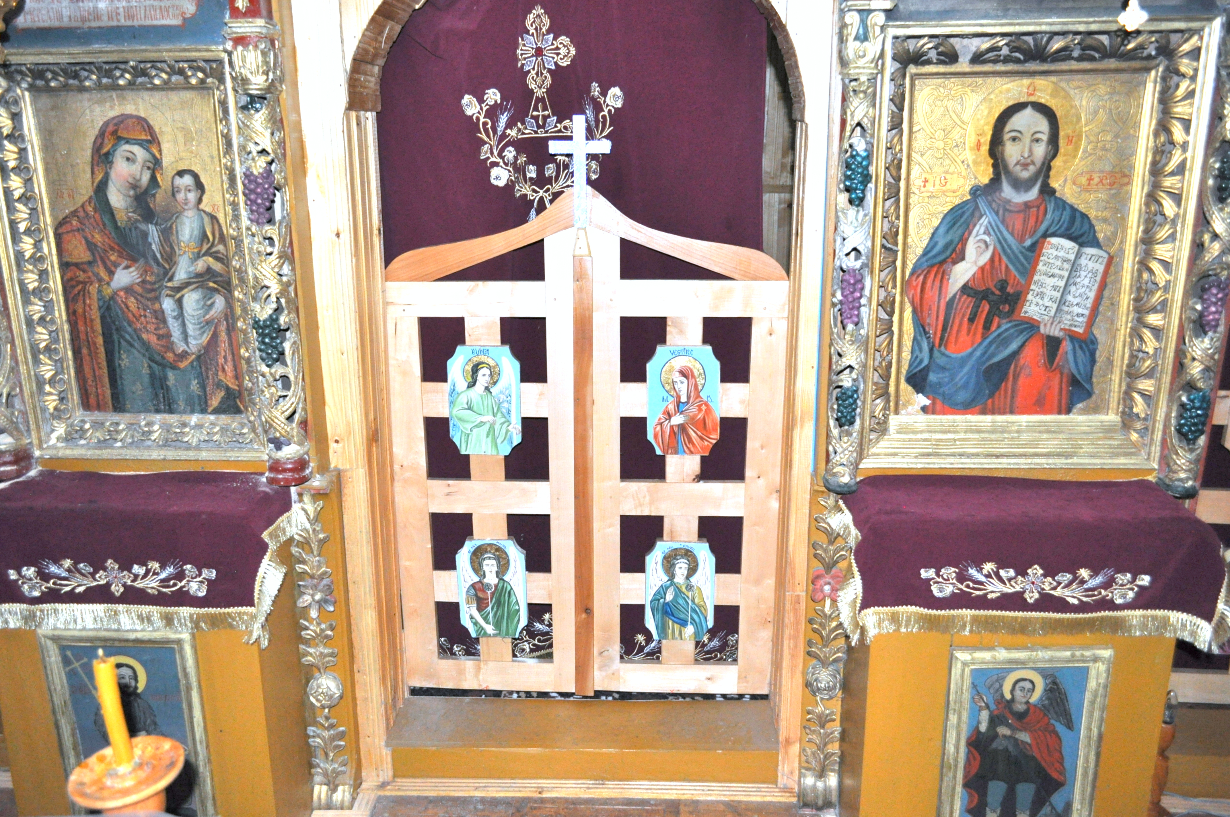 Biserica de lemn "Cuvioasa Paraschiva", sat IZVOARELE; comuna CERNEŞTI